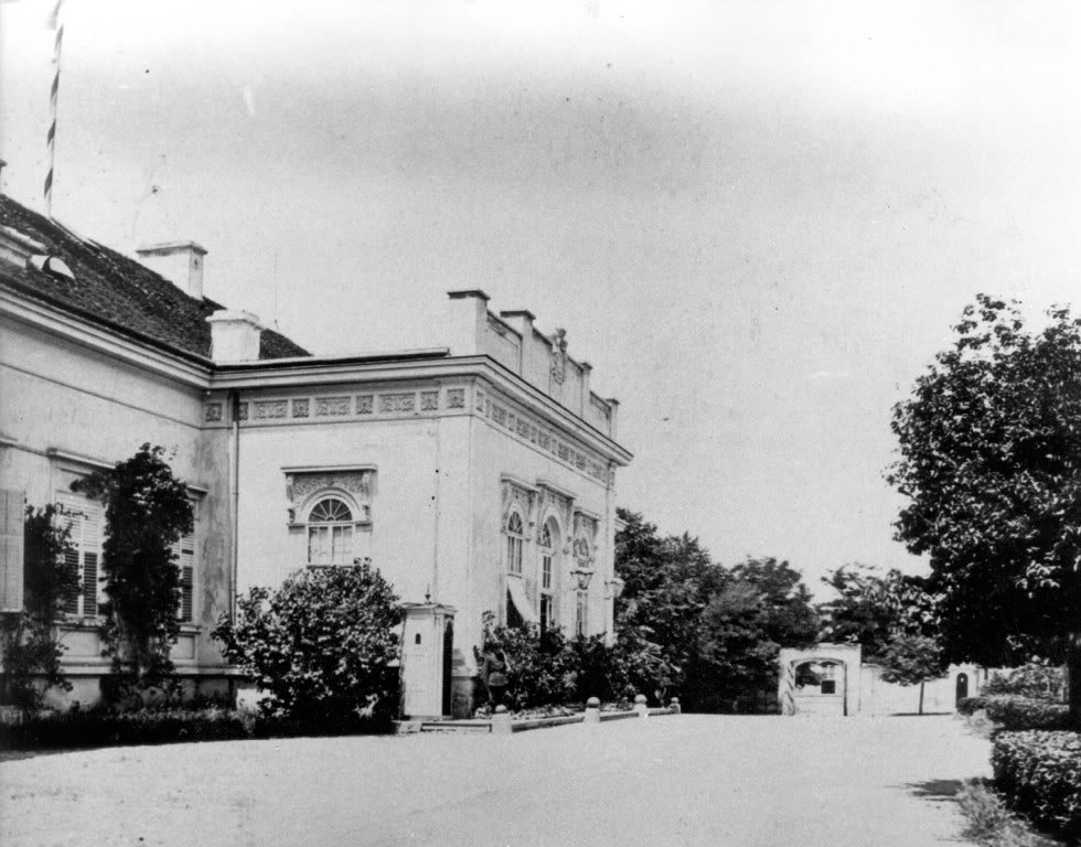 Стари Конак, кнежевски и краљевски двор у Београду